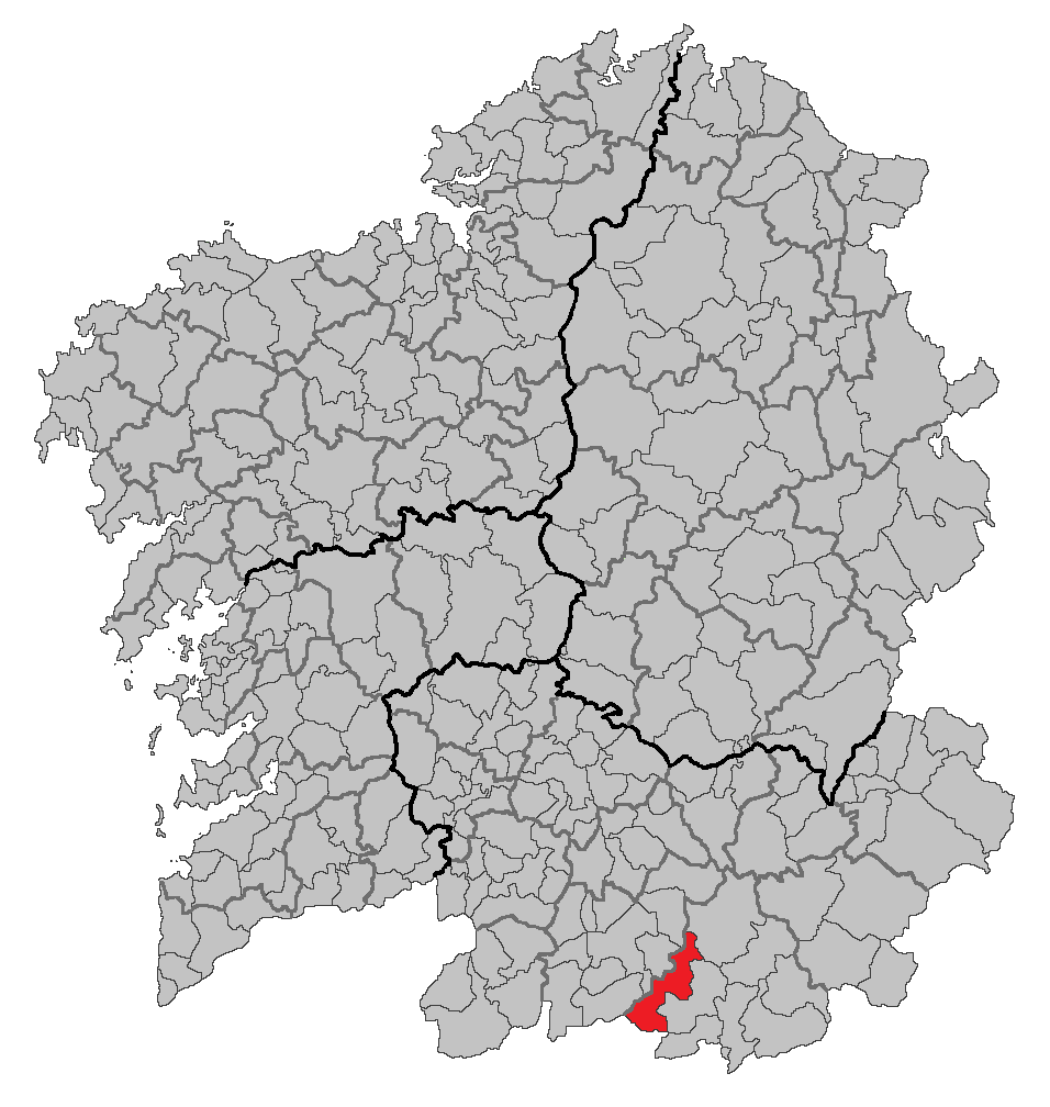 Mapa coa localización do concello de Cualedro.